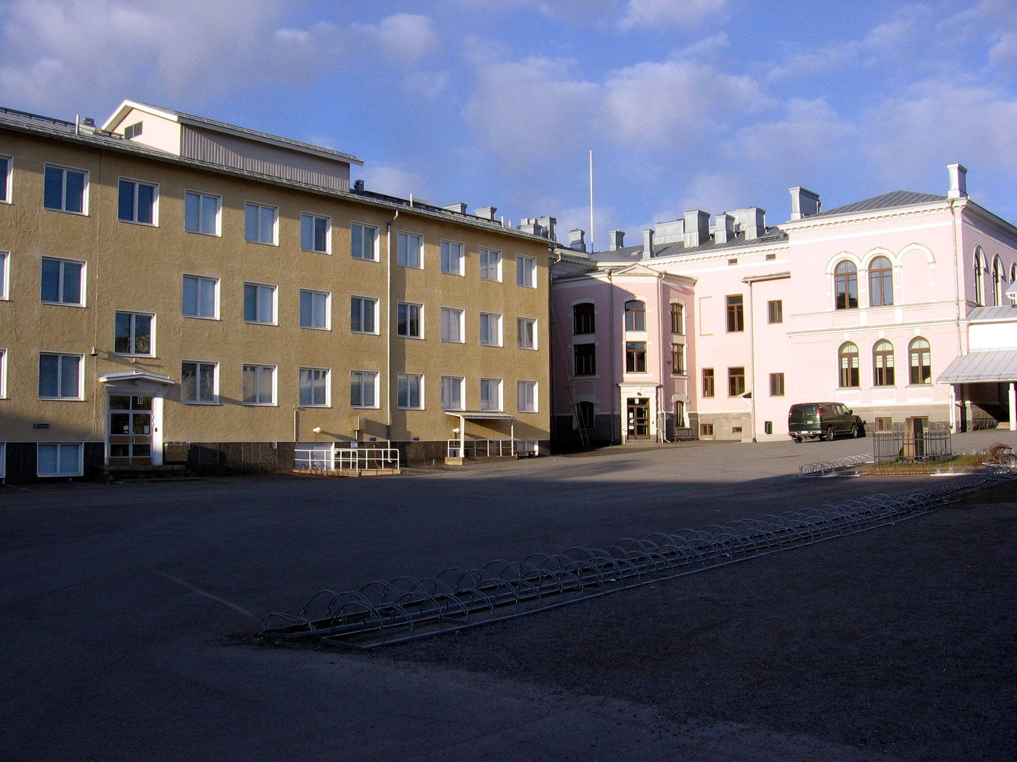 Porin Lyseo